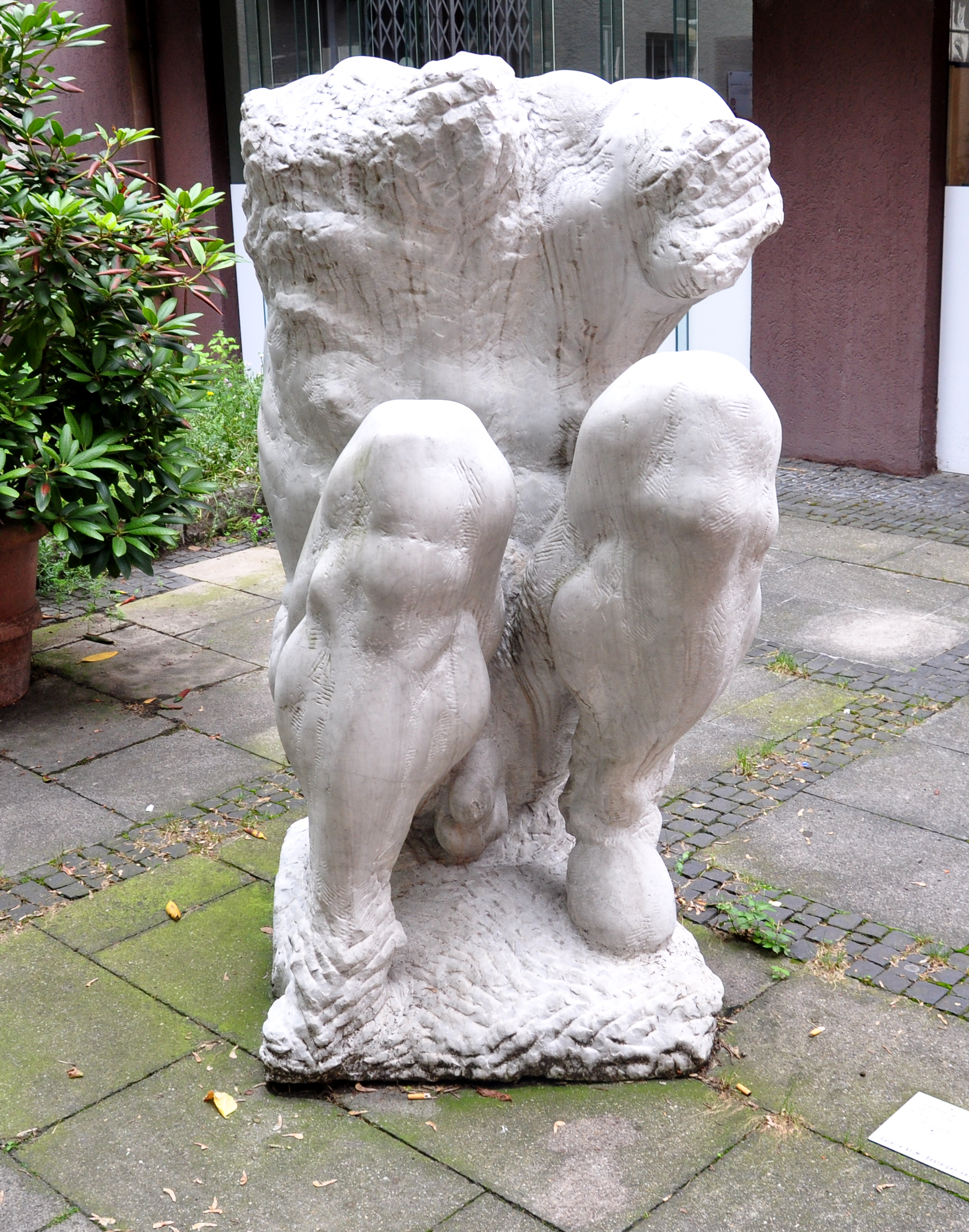 Stuttgart, Bad Cannstatt, Thomas Rissler: Torso SATYR, 1993, Carrara-Marmor, 150 x 80 x 80 cm, Gewicht: 11,5 t (permanent im öffentlichen Raum aufgestellt von Kunsthaus & Galerie Keim, Marktstraße 31, Bad Cannstatt)